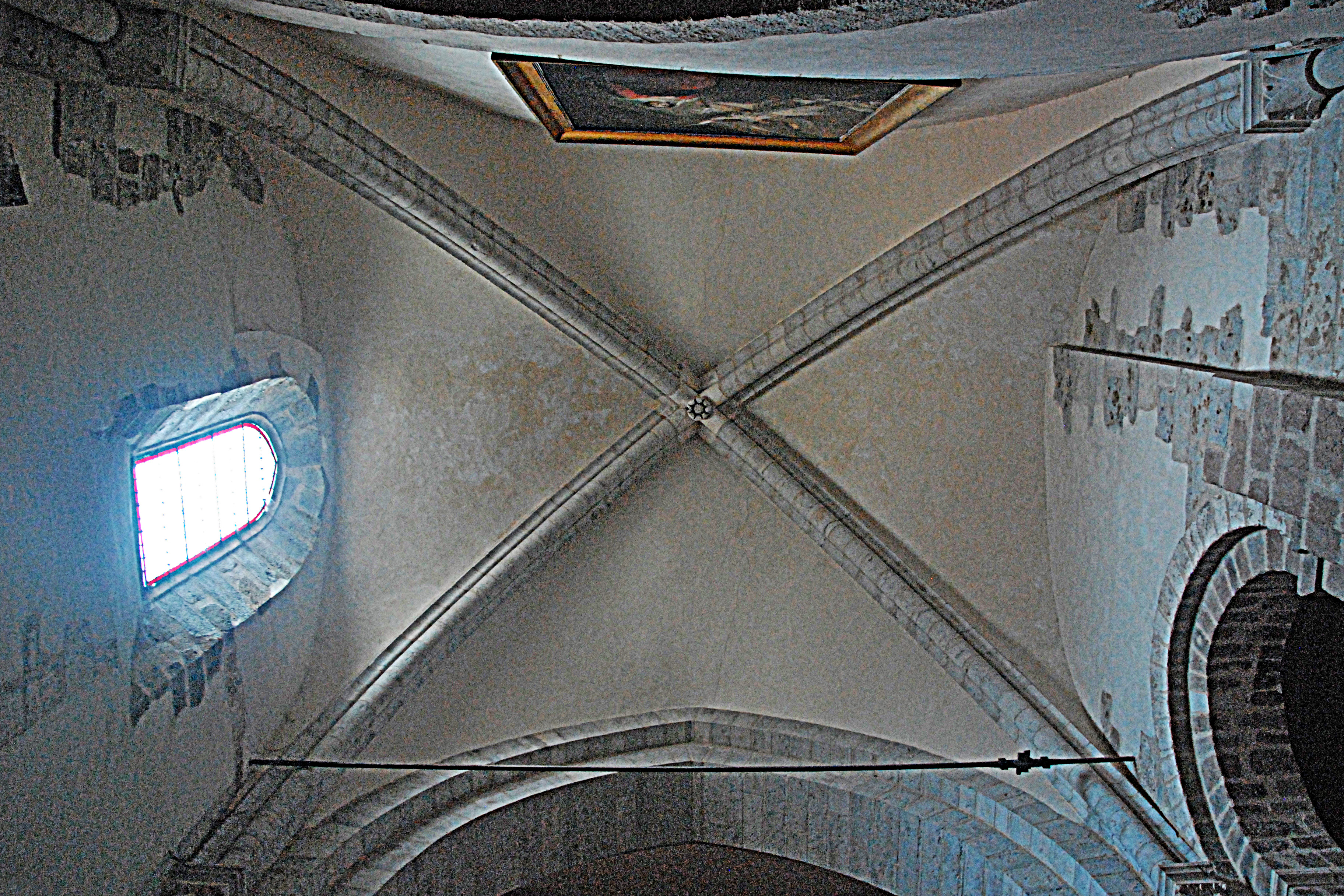 Neuvy_St.-Sépulcre, Basilika, Mittelschiff, Gewölbe Joch 1